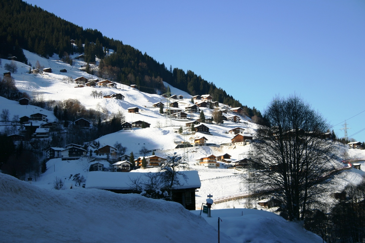 Duerf am Montafon Januar 2006.